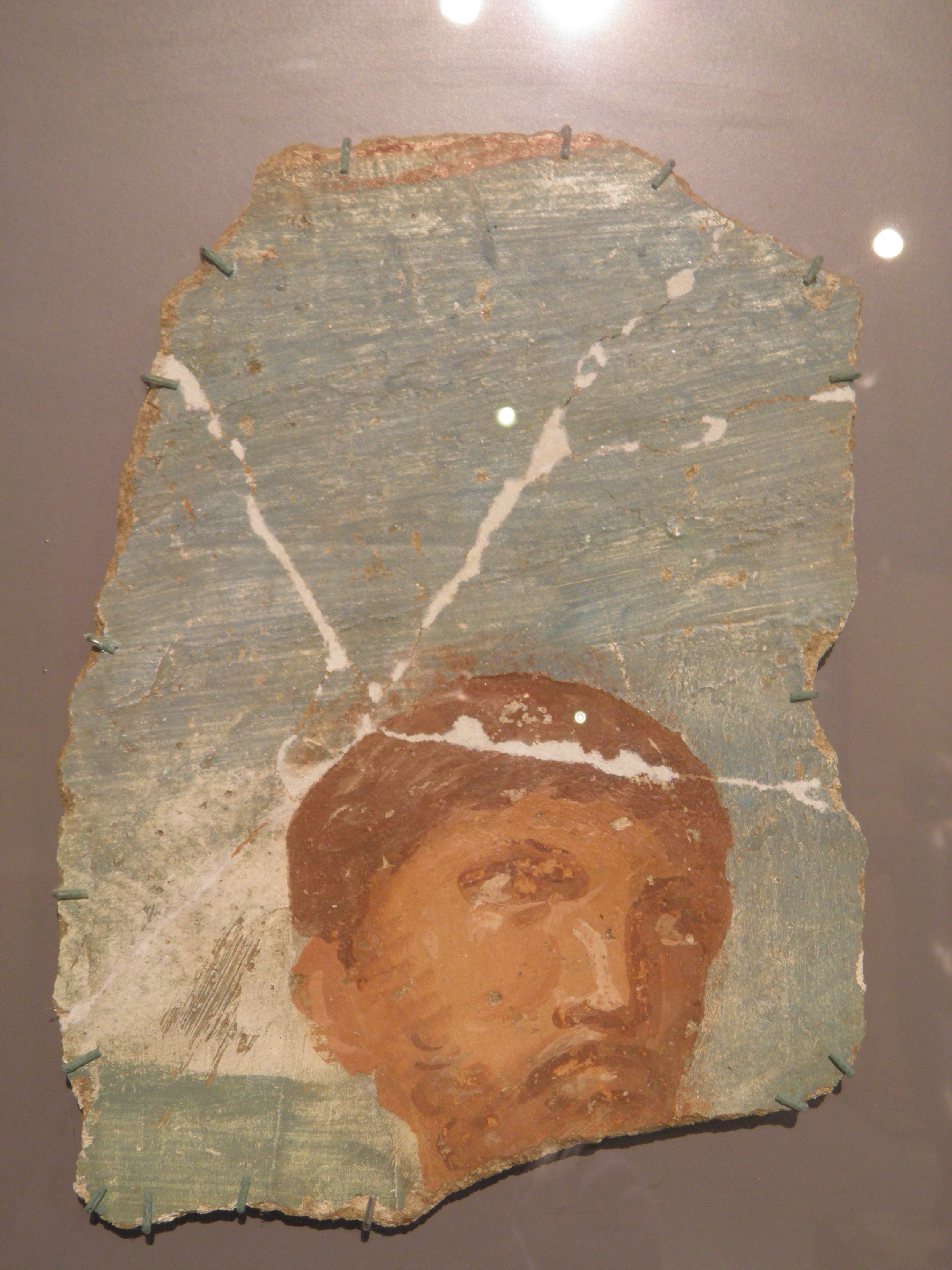 Xanten, Germany